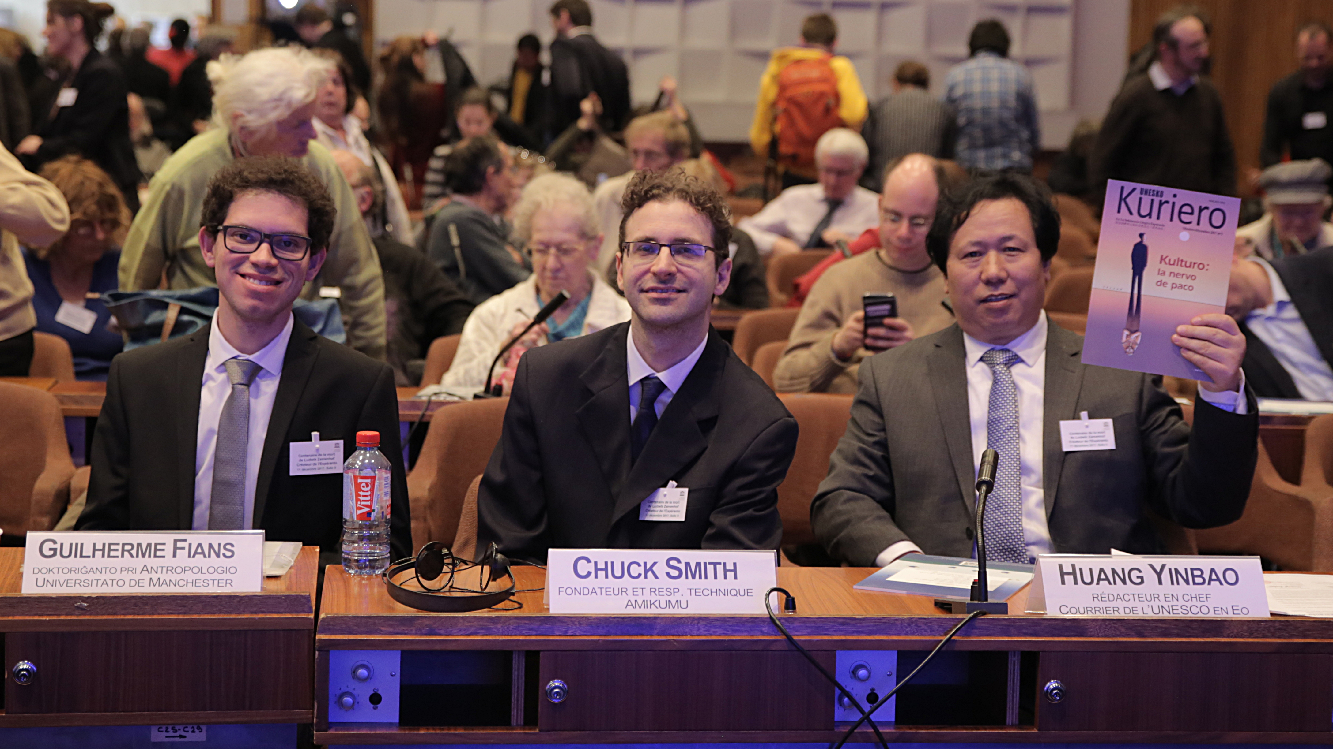 Gilherme Fians, Chuck Smith kaj Trezoro Huang Yinbao en la Pariza sidejo de Unesko okaze de memorfesto de la 100-a morto-datreveno de Zamenhof